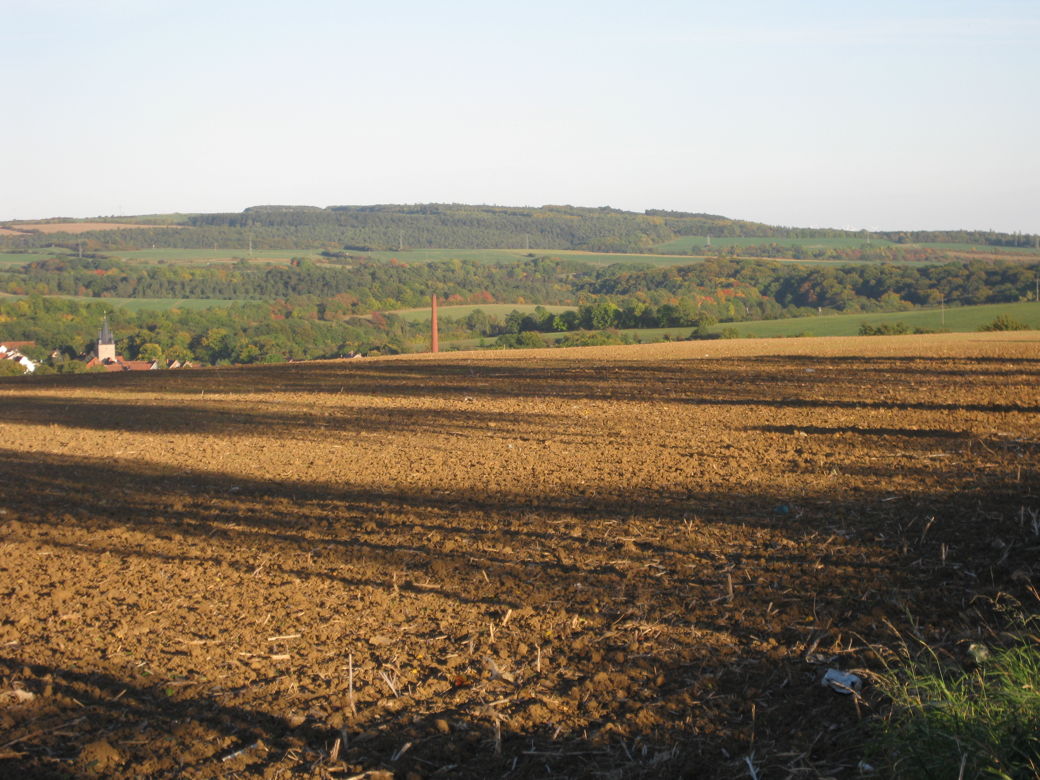 Der Forstberg (Dün) bei Mühlhausen (links am Bildrand die Kirche von Dachrieden im Unstruttal) von Westen gesehen